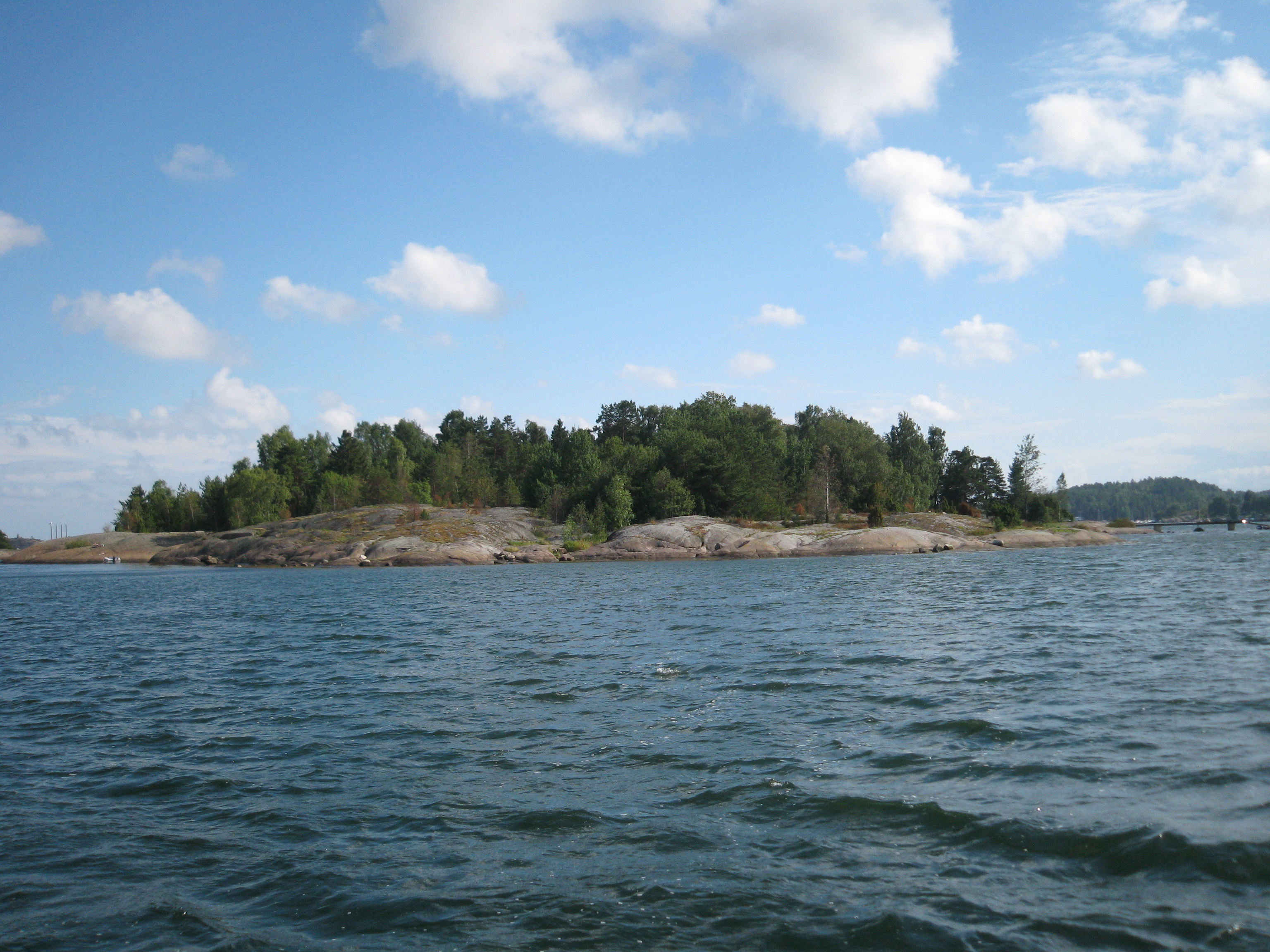 Fra brygga på Tønsberg seilforening, Fjærholmen